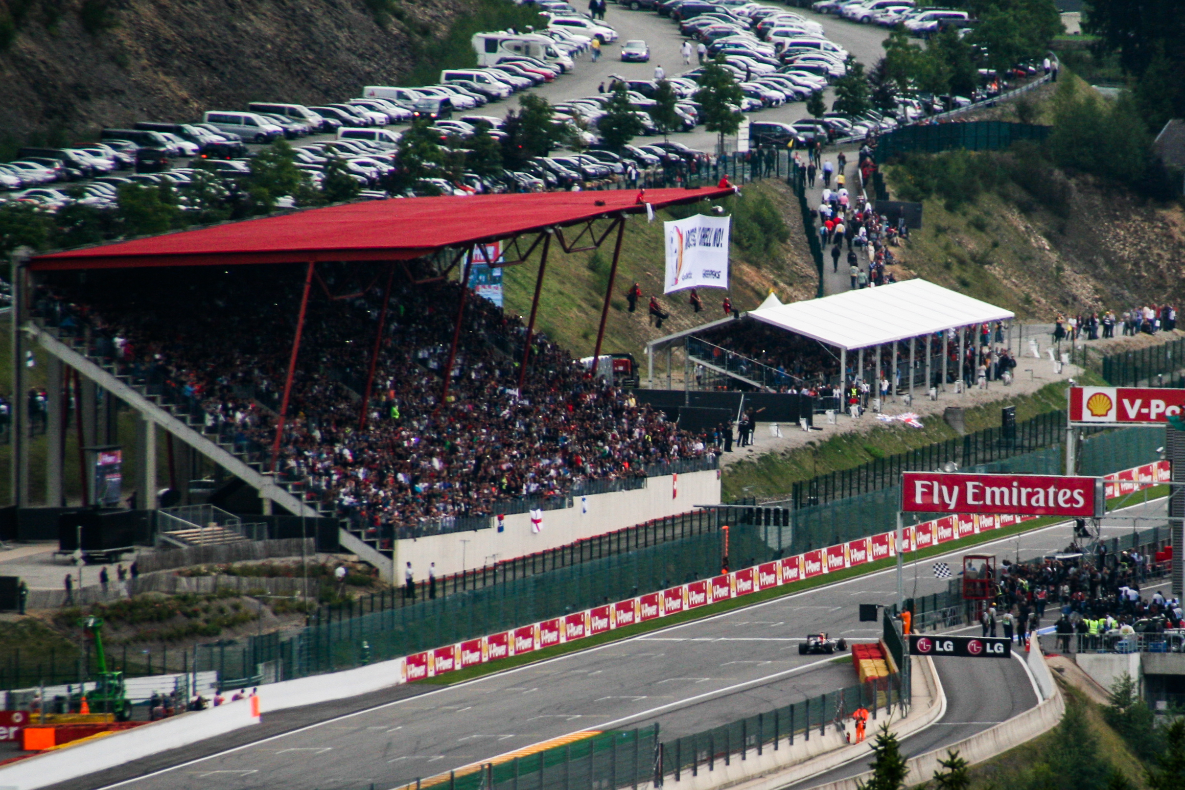 Zieldurchfahrt Vettels